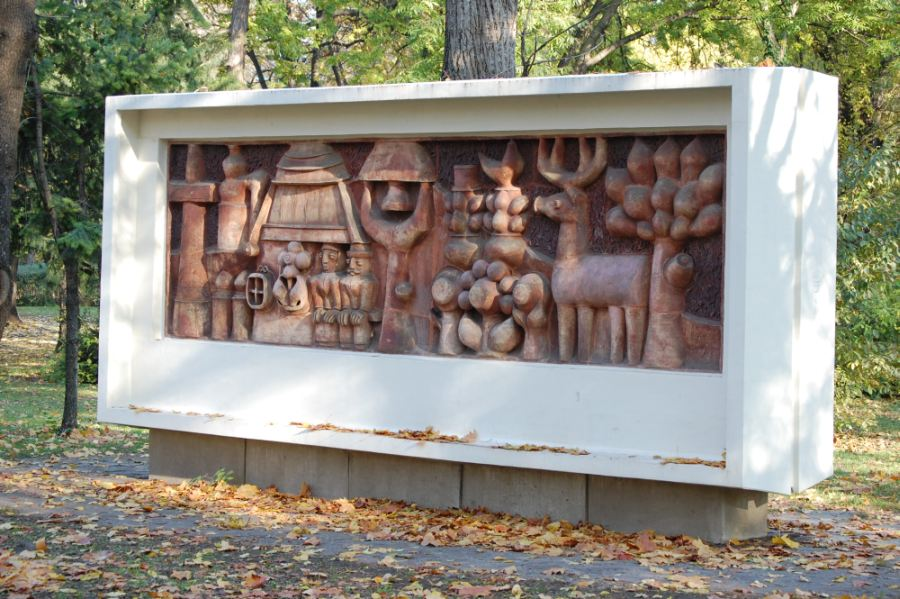 Németh János: Göcsej – dombormű (Népliget, Budapest, X. kerület, Magyarország)